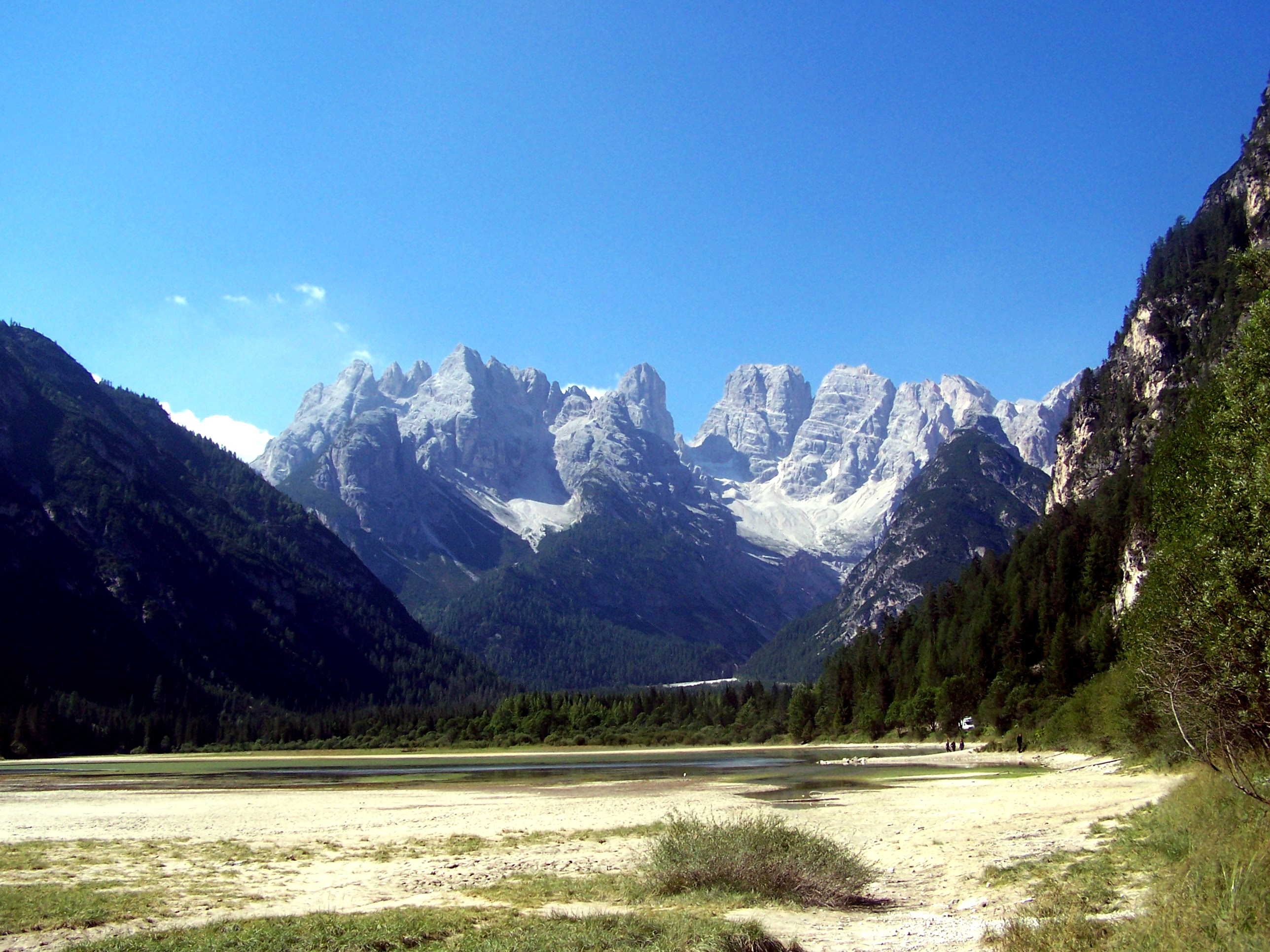 Dürrensee mit Cristallo-Gruppe